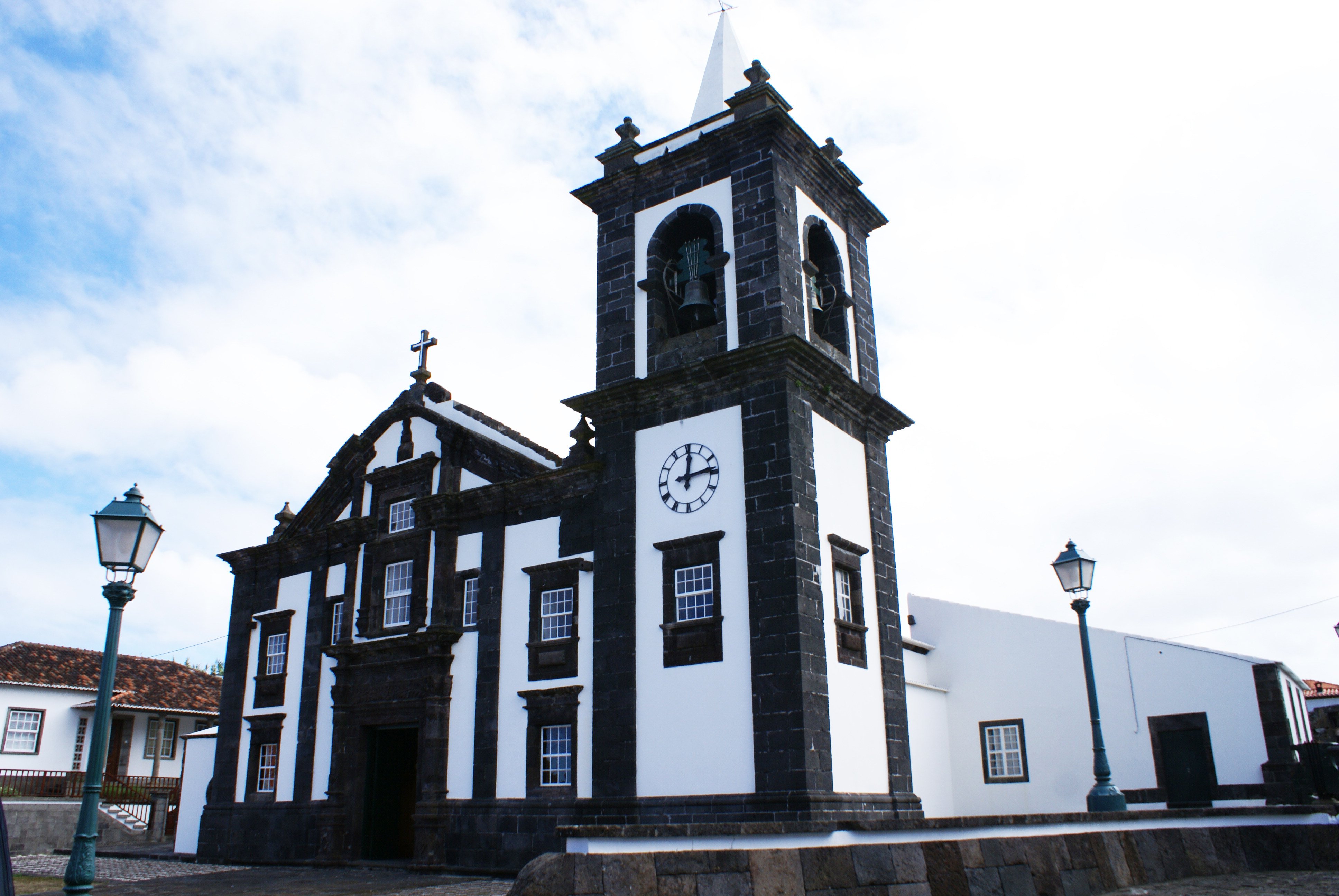 Igreja Matriz de Santa Cruz da Graciosa, fachada, Santa Cruz da Graciosa, ilha Graciosa, Açores, Portugal